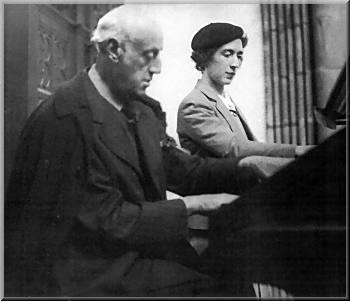 Photographie d'Ermend Bonnal à la console de l'orgue Wenner de l'église Saint-André de Bayonne en compagnie de son élève et successeur à cette tribune en 1933